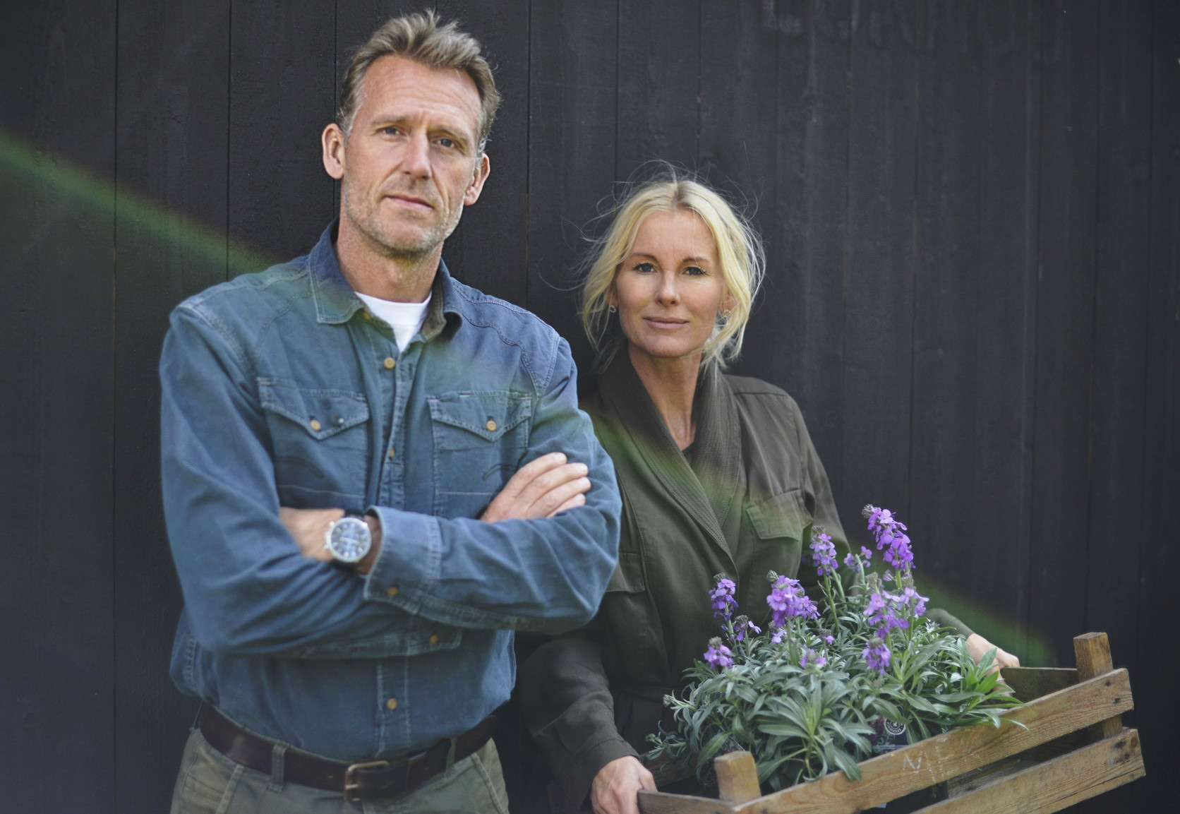 Zetas ägare Rikard Skoglund och Victoria Skoglund.